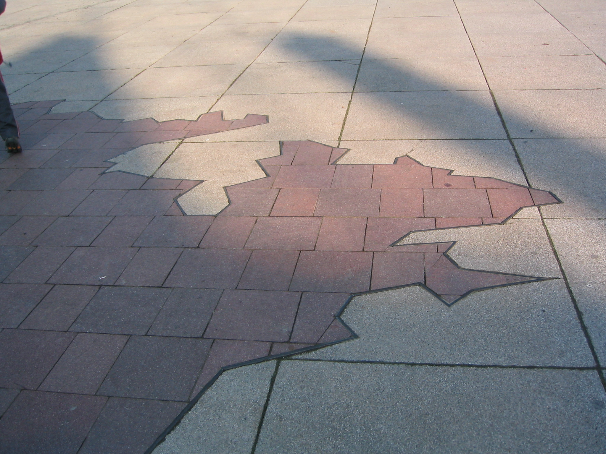 Gros plan sur une partie (le nord-est) de la carte du Nouveau Monde en grès encastrée dans le sol de la place Charles-de-Gaulle à Saint-Dié-des-Vosges, en souvenir du "baptême de l'Amérique" dans cette ville en 1507.